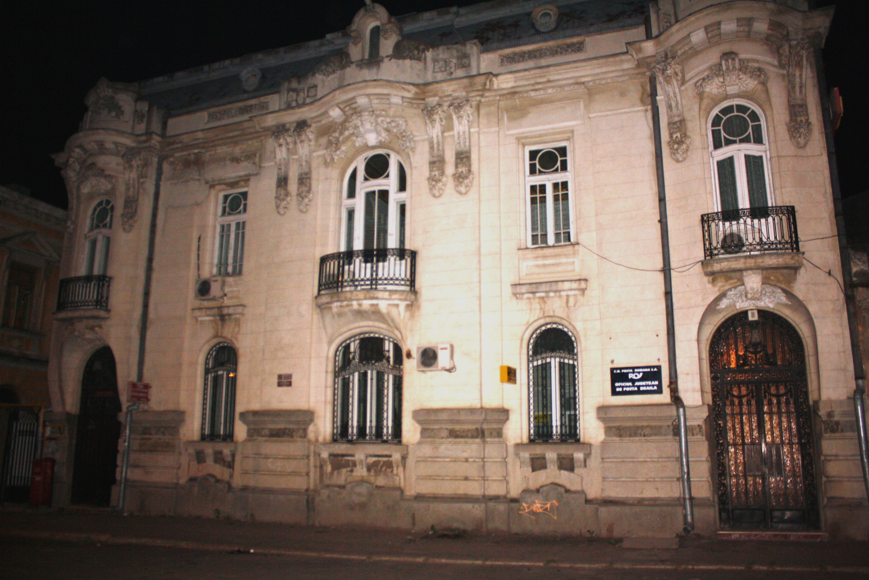 Fosta Bancă Agricolă, azi Direcția de Poștă, Str. Danubiului 8, Braila